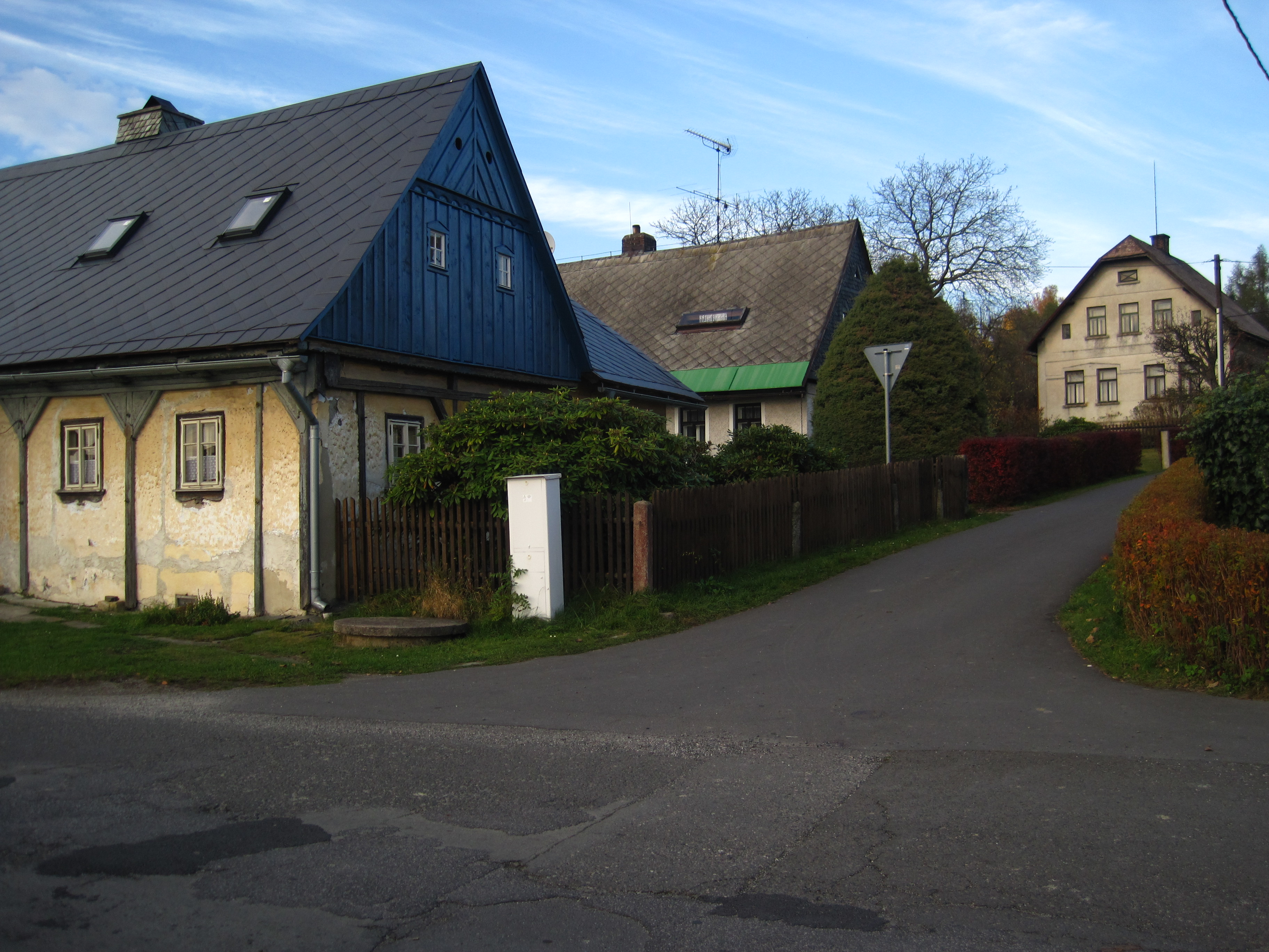 Radčice (na Železnobrodsku) - chalupa čp. 14, v pozadí čp. 49 a čp. 66